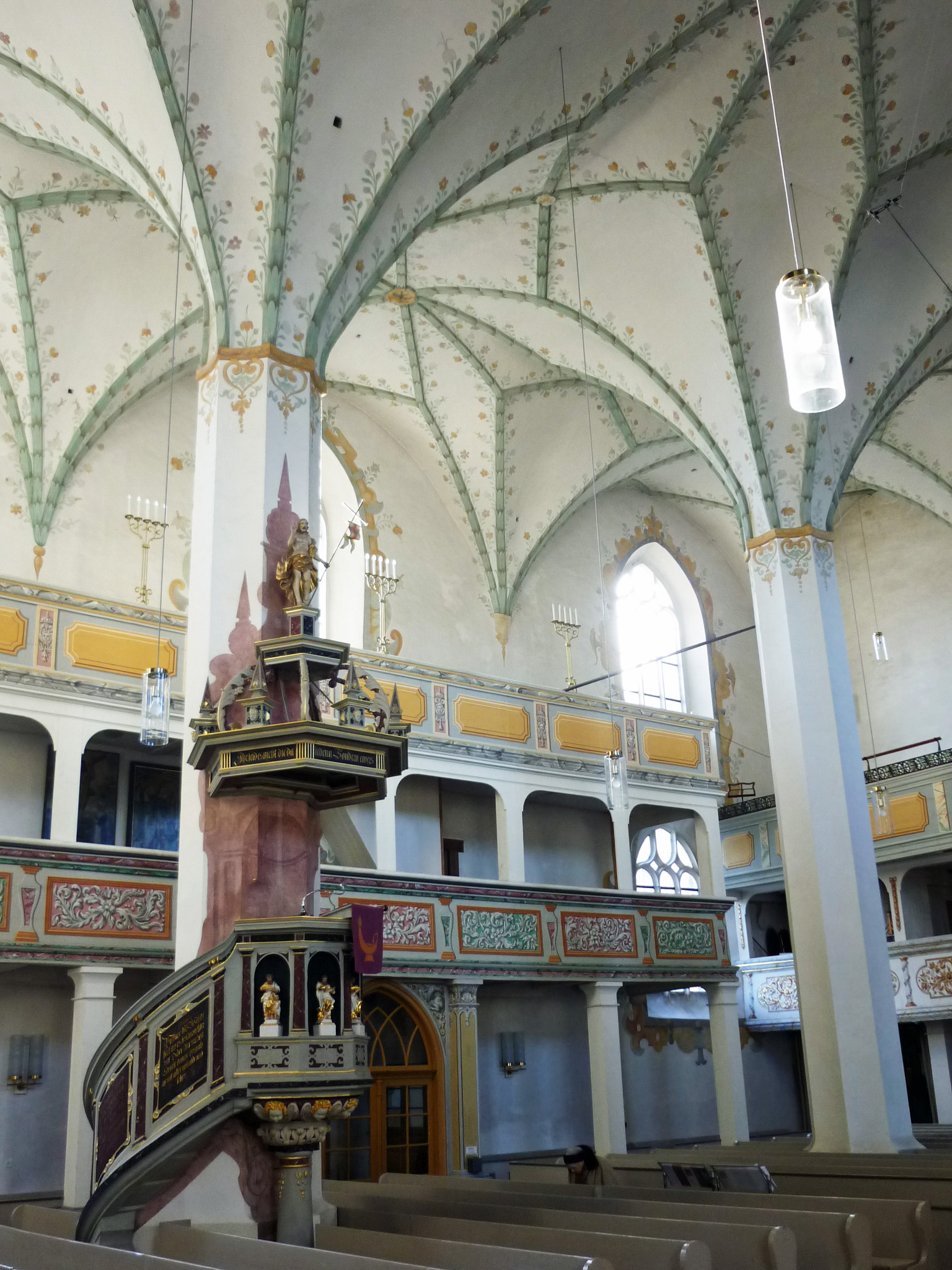 Kanzel im Kirchenraum der Laurentiuskirche in Dippoldiswalde